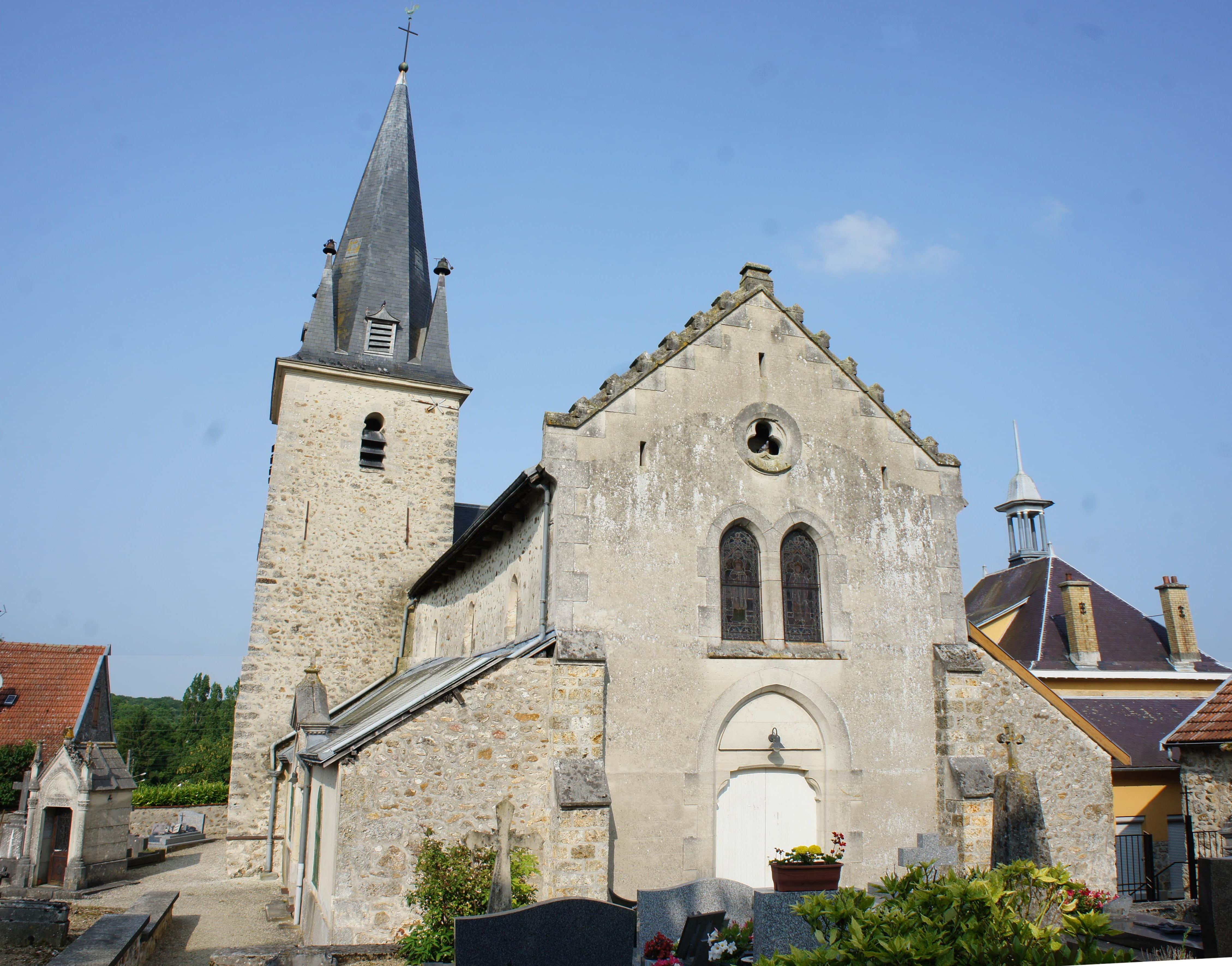 L'église de Ville en Selve.